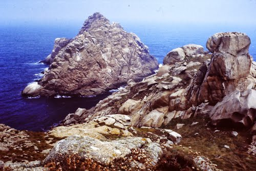 Islas Cies Nord 1996